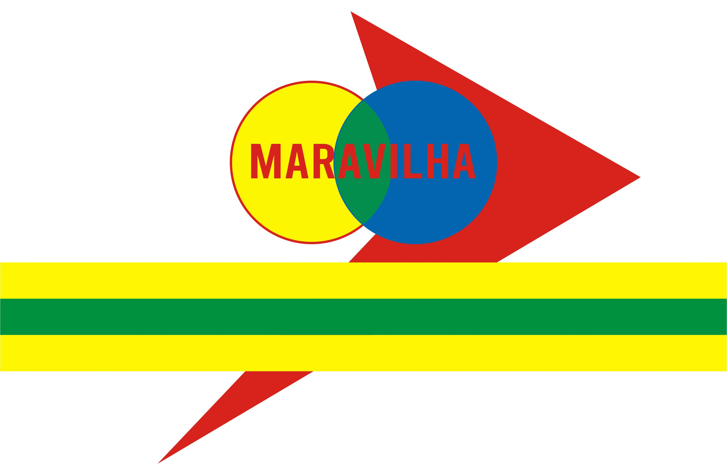 A bandeira criada pela lei n°. 344, de 15 de maio de 1970.